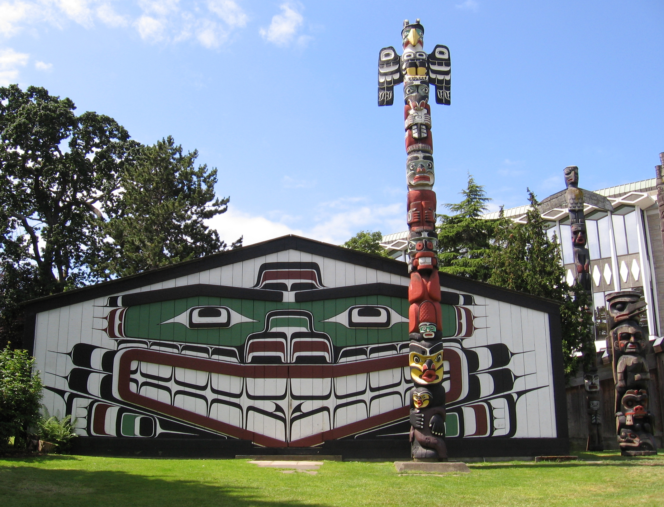 Summary Thunderbird Park, 2006. Left to right: Mungo Martin House aka Wawadit'la (traditional Kwakwaka'wakw "big house", 1953), Kwakwaka'wakw heraldic pole (1953), Kwakwaka'wakw pole (1981), Kwakwaka'wakw pole (1954). (Reference retrieved 2006-06-24)